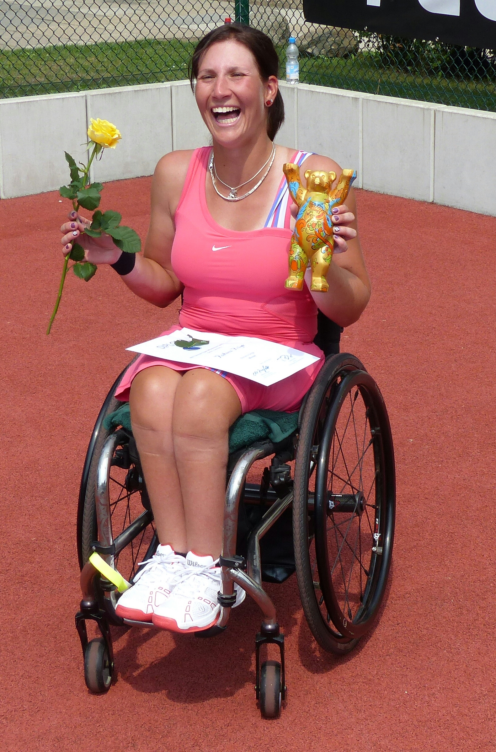 German Open wheelchairtennis 2014